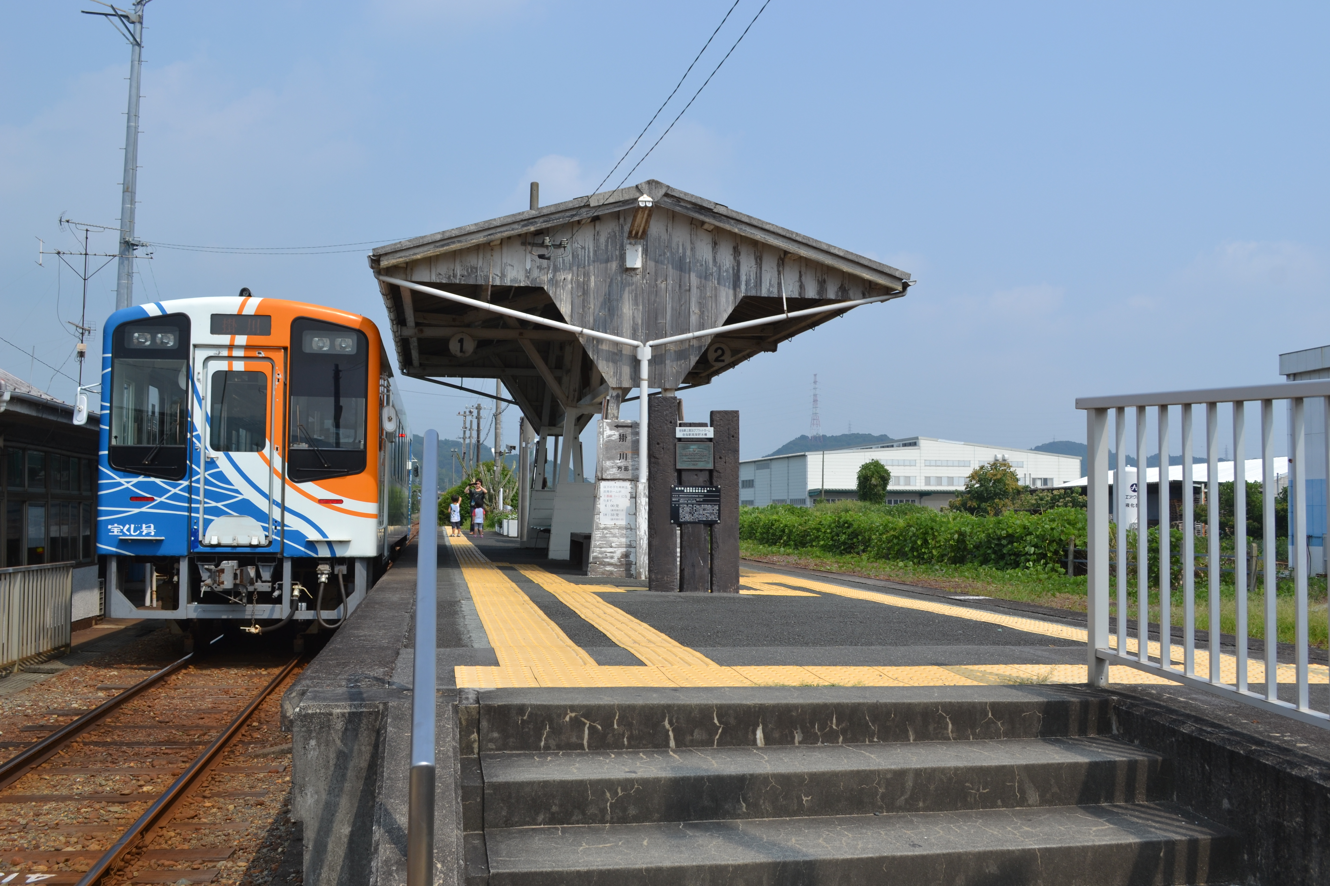 金指駅プラットホーム